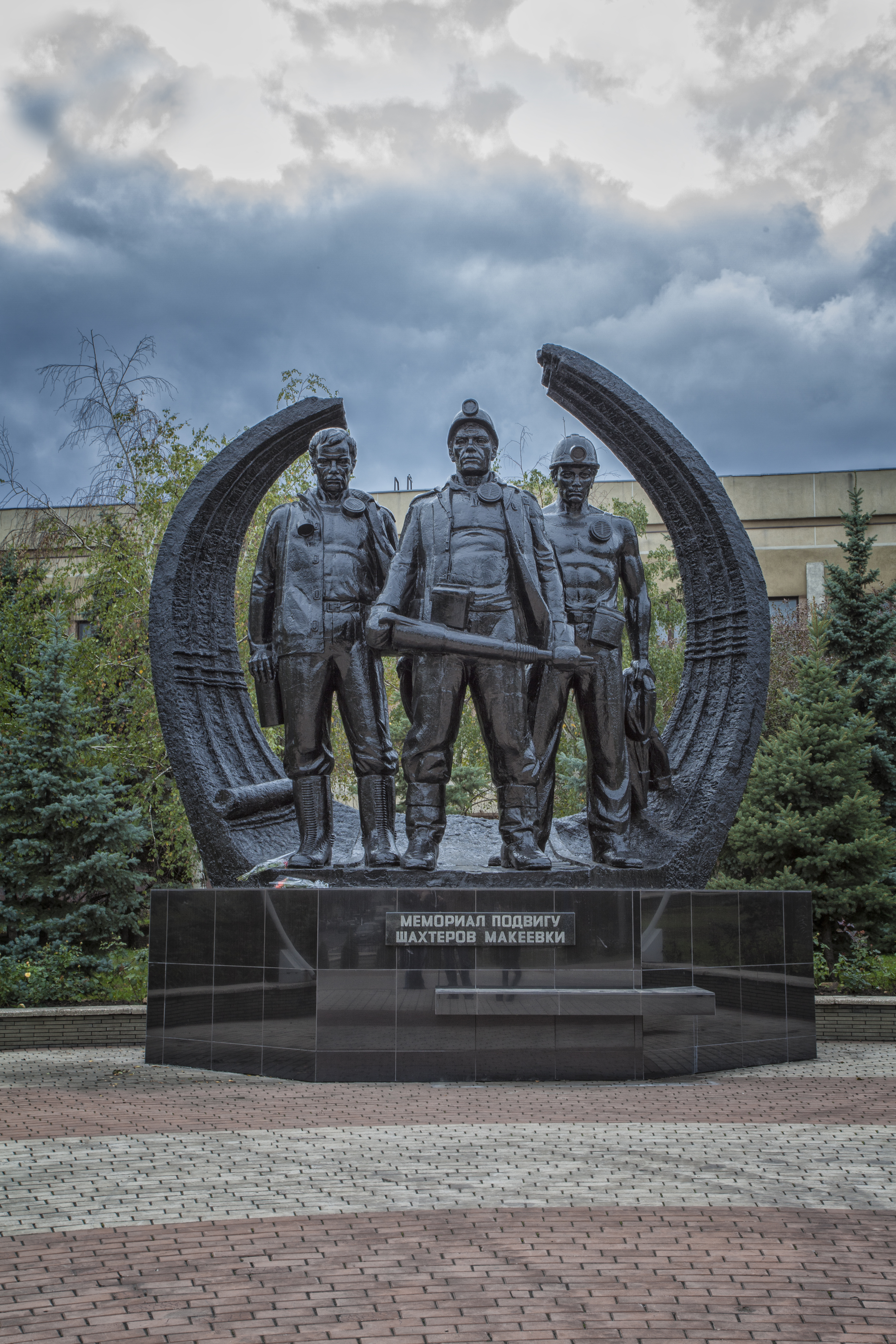 Пам'ятник на честь подвига шахтарів м. Макіївки, Макіївка, Центрально-Міський р-н, Перехрестя пр. 250-рі Донбасса і вул. Московської